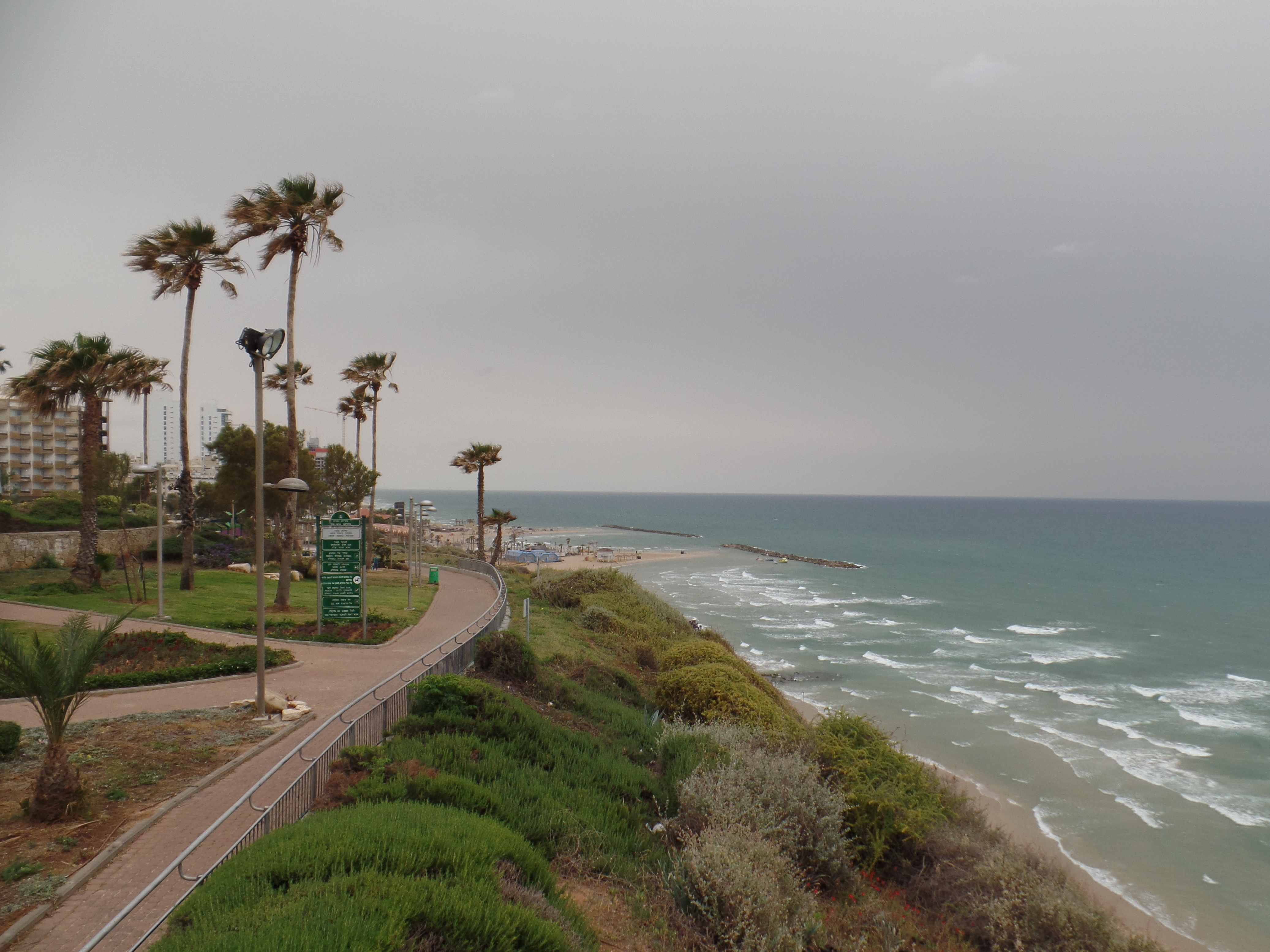 מבט מכיוון צפון על חוף הים בנתניה